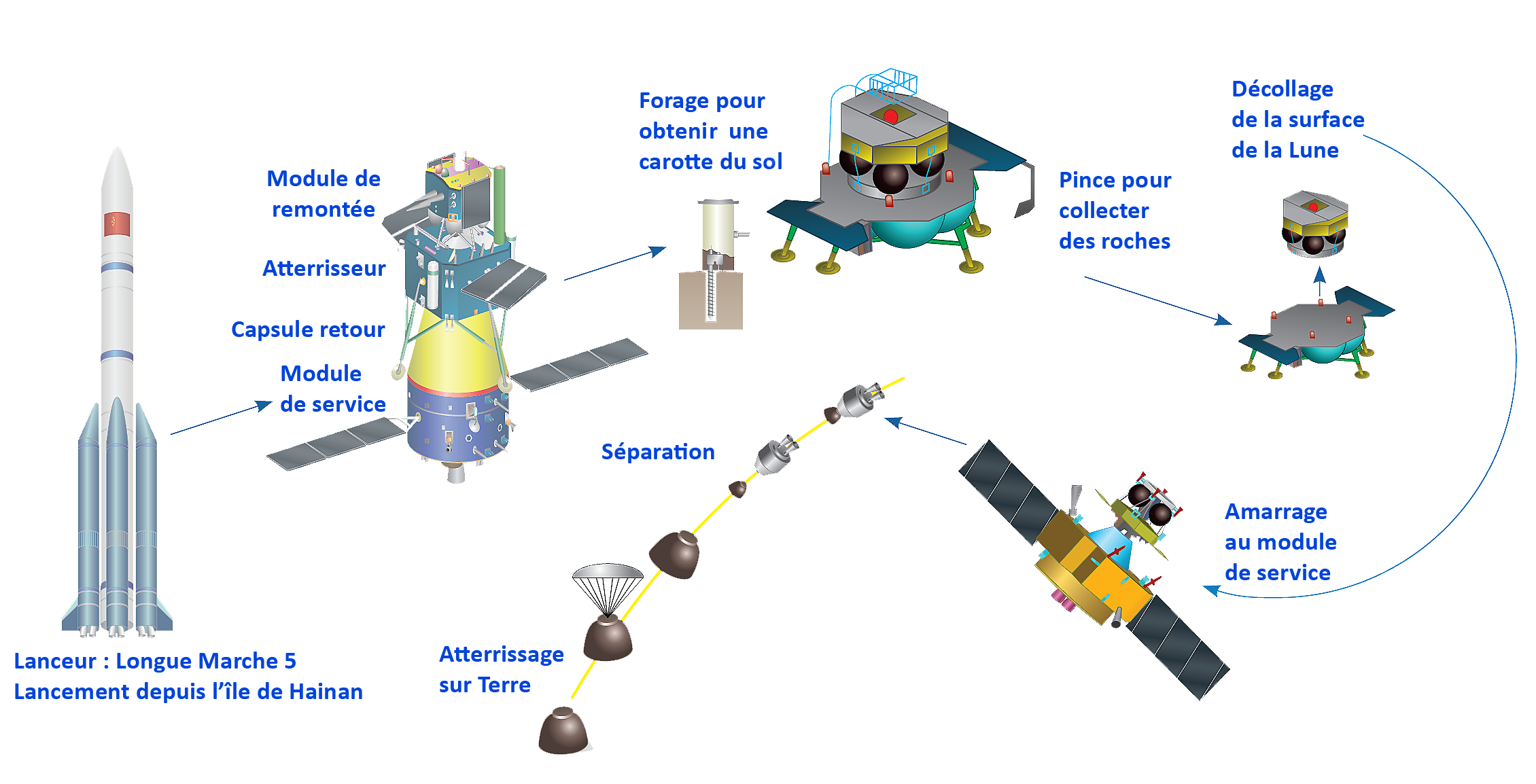 Déroulement de la mission chinoise Chang'e 5 de retour d'échantillon lunaire